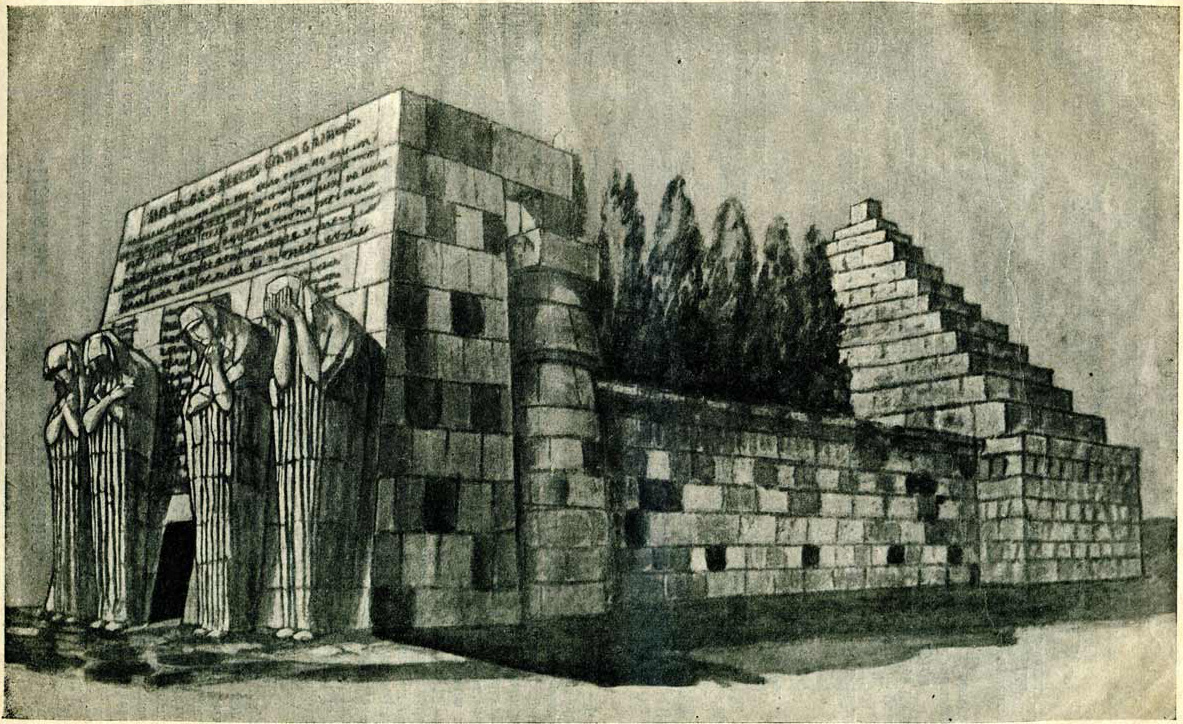 Проект памятника Мировому страданию